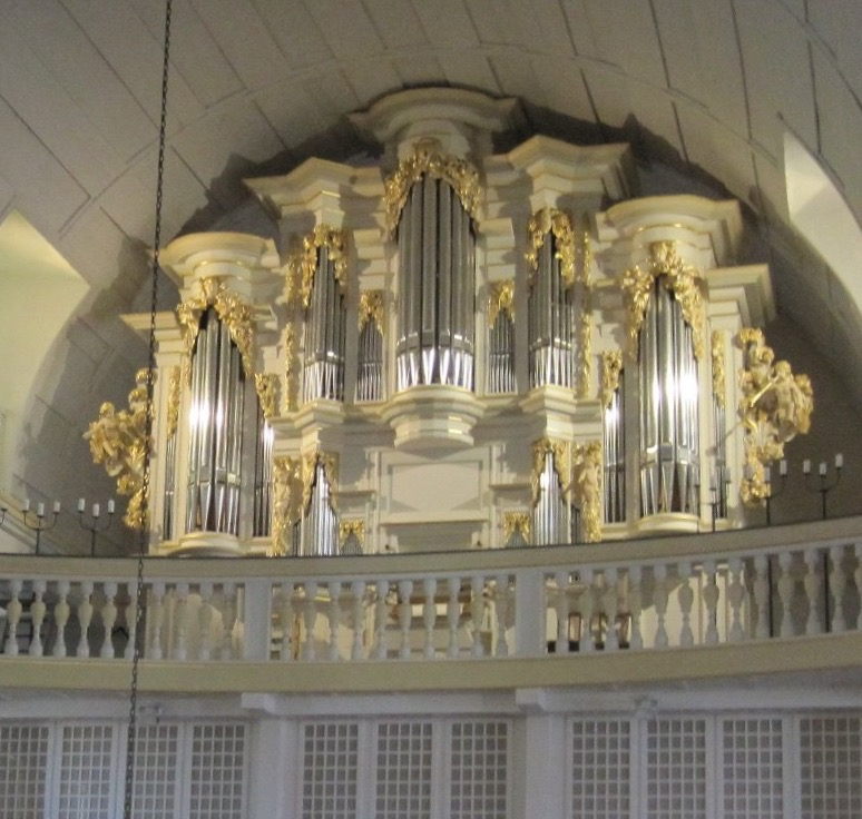 Die Wender-Orgel der Bachkirche Arnstadt